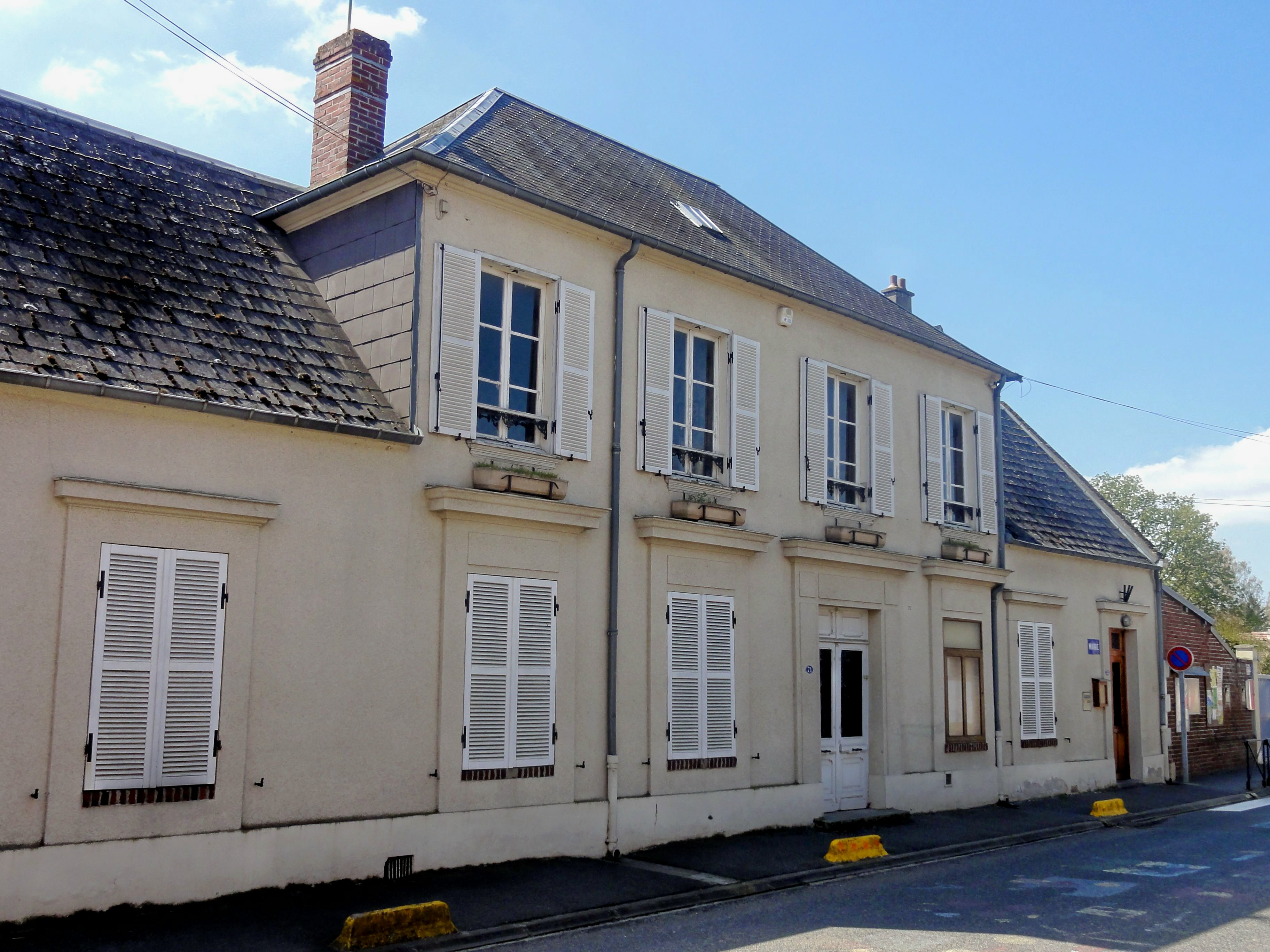 La mairie, sur la Grande Rue, à l'ouest du village.